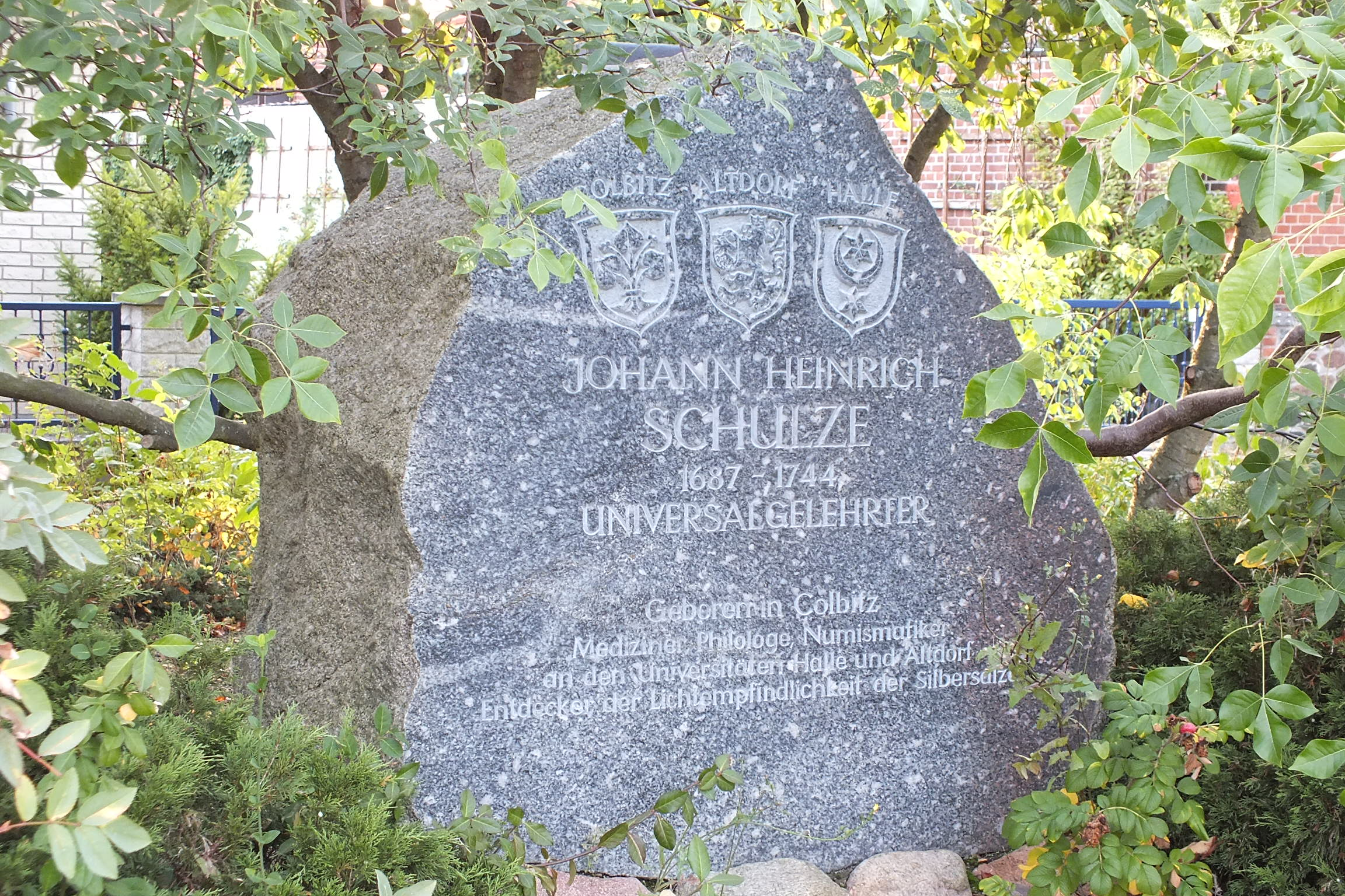 Gedenkstein für Johann Heinrich Schulze in Colbitz (Sachsen-Anhalt, Deutschland)